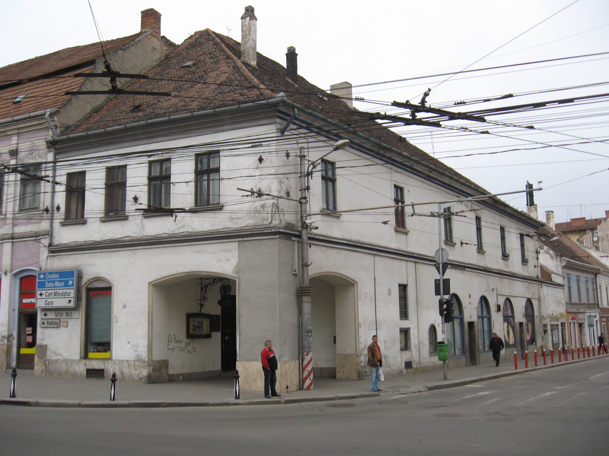 Mauksch-Hintz-ház (Főtér, Kolozsvár)